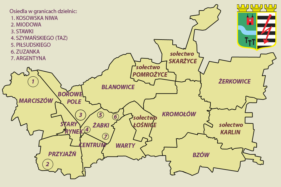 Podział Zawiercia na dzielnice i sołectwa. Mapa stworzona w opraciu o materiały ze strony internetowej Urzędu Miejskiego w Zawierciu.